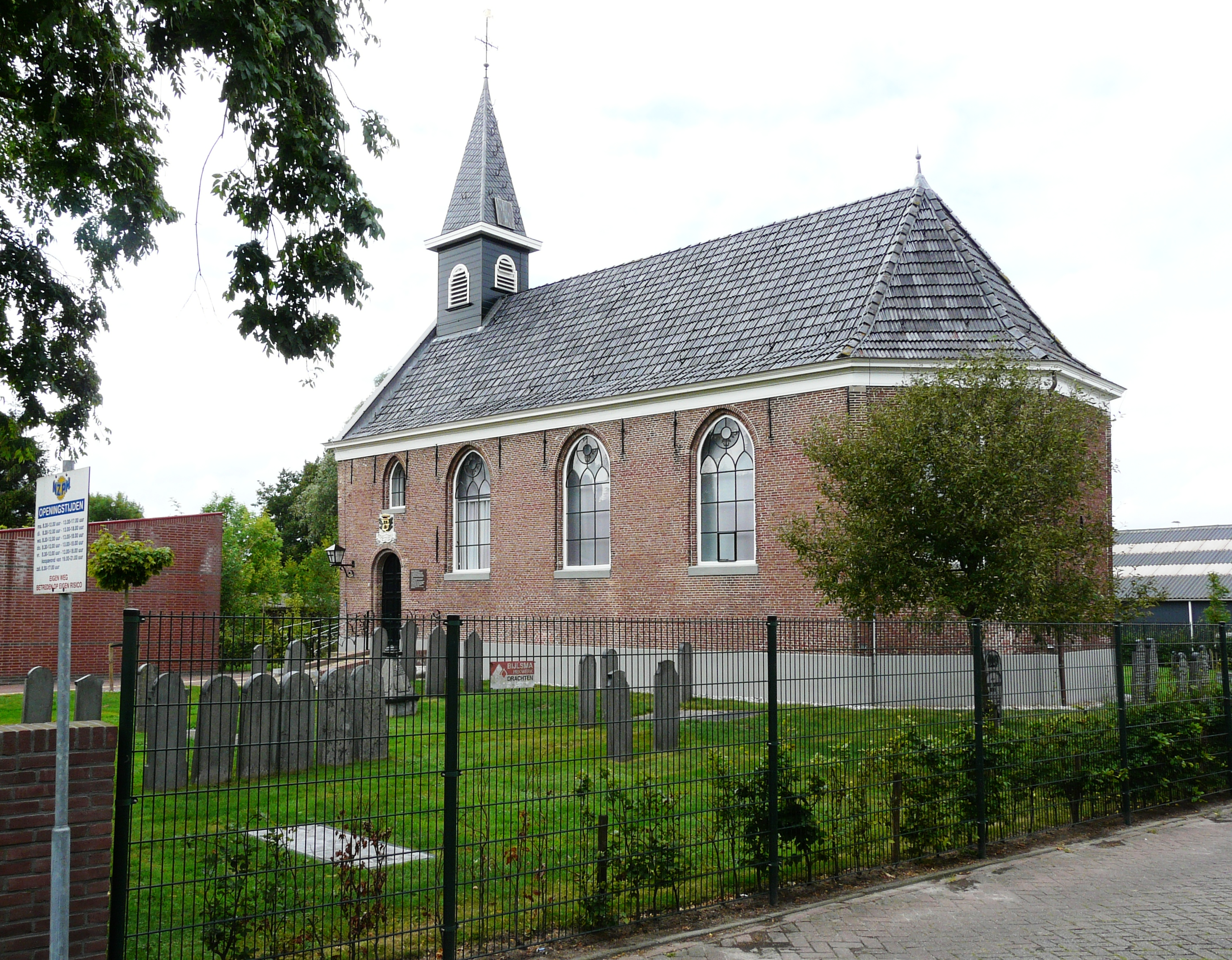 Het kerkje van Surhuisterveen